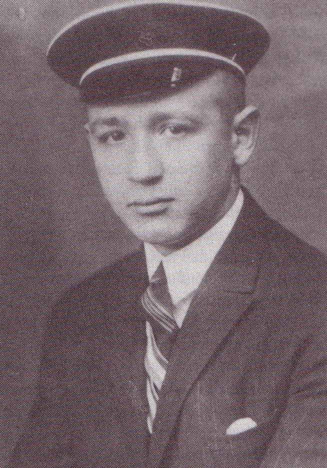 Fotografie von Herbert Fox als Angehöriger des Corps Palaiomarchia